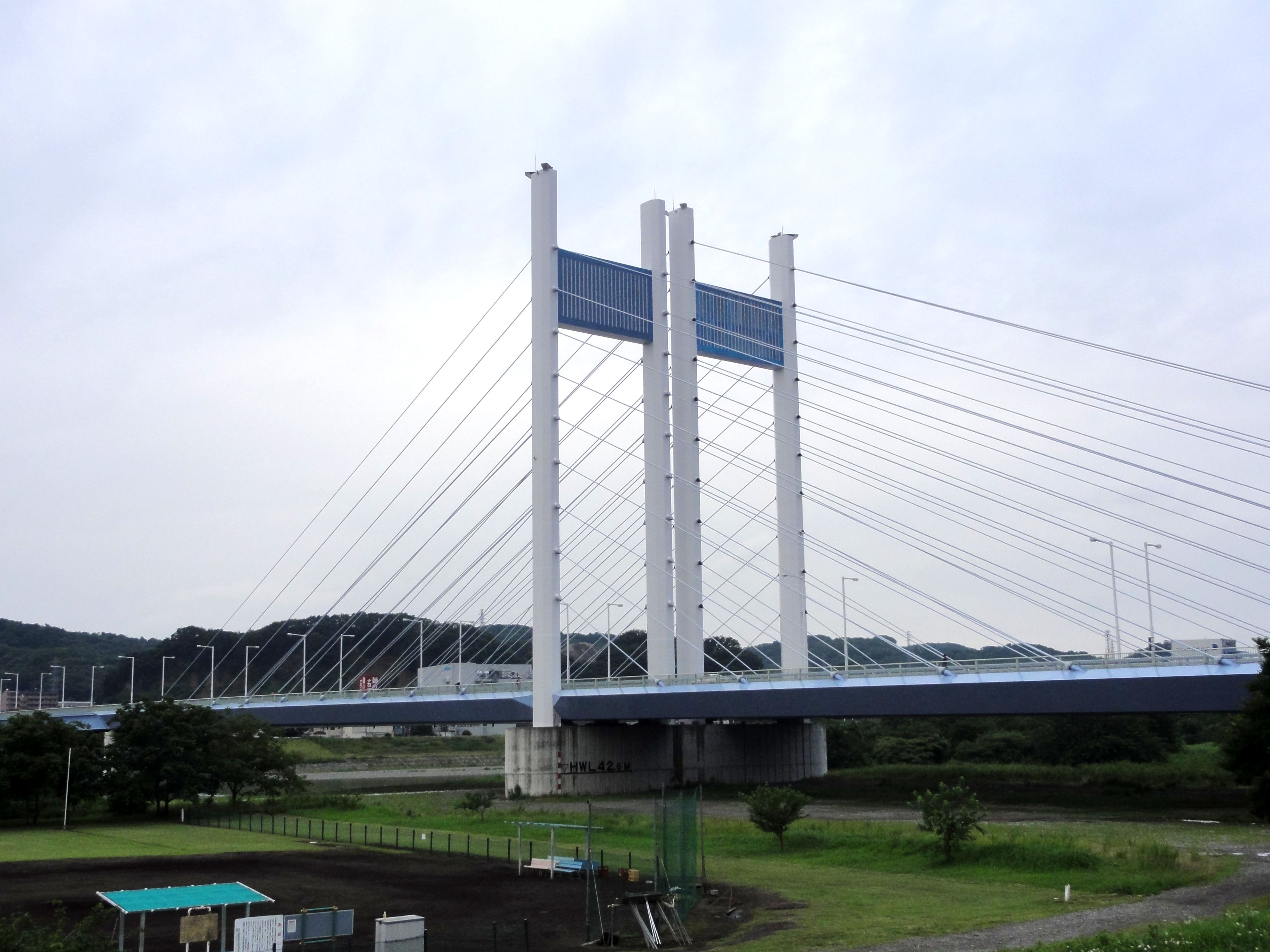 是政橋 府中市是政で撮影